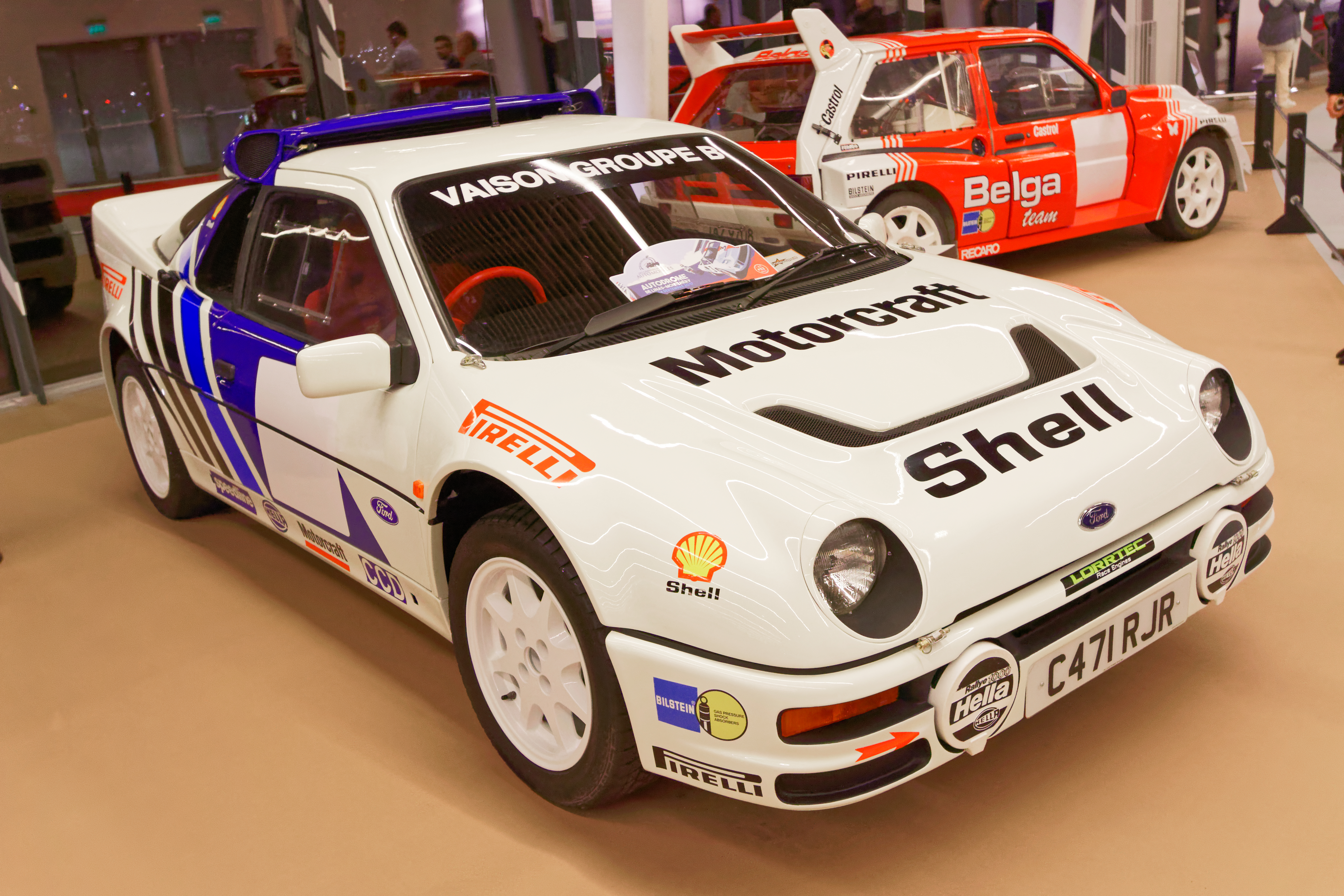 Une Ford RS 200 produite entre 1984 et 1986 exposée lors du salon Rétromobile 2017.